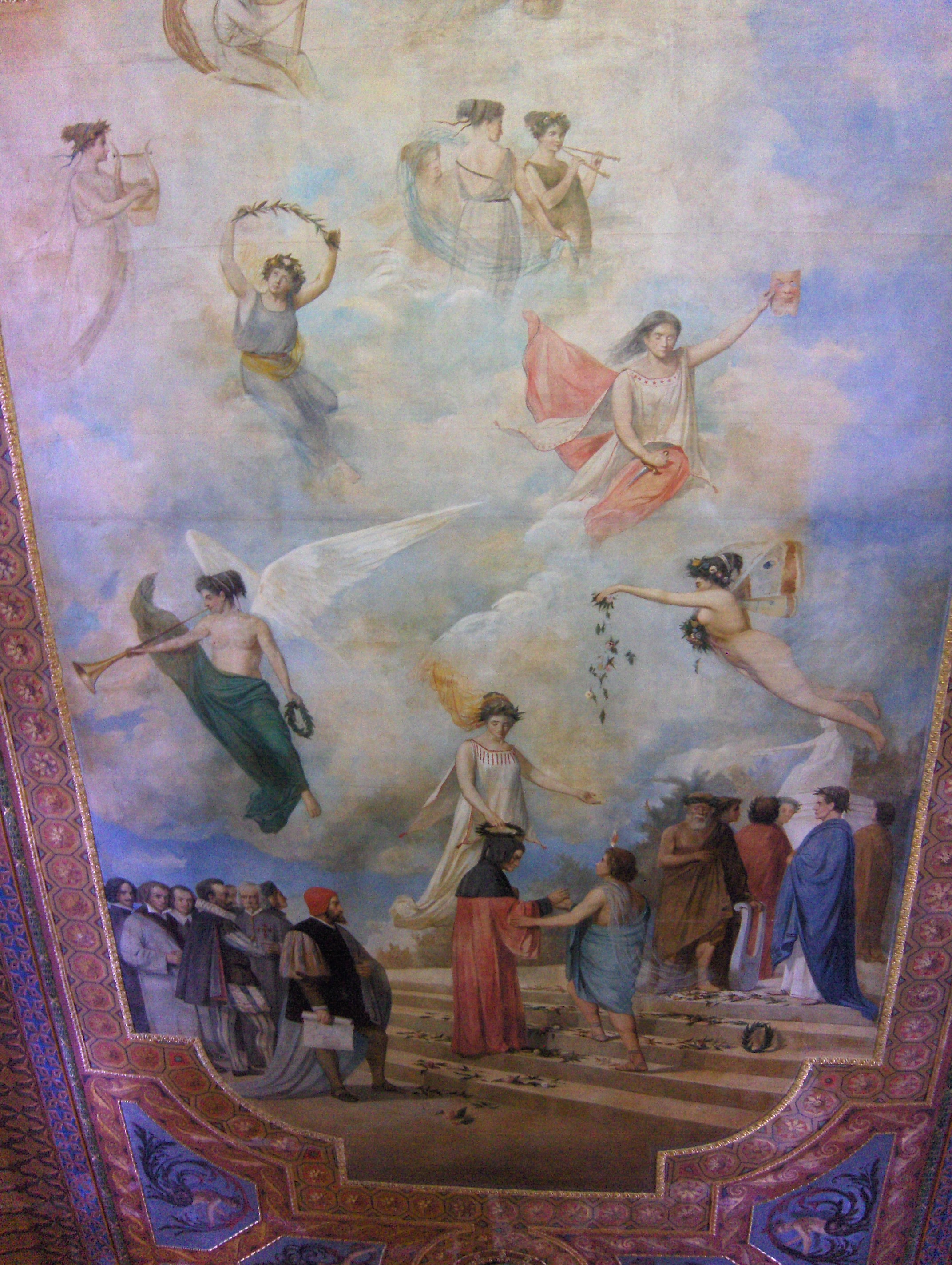 La coronación de Dante. Autor: Joaquín Martínez de la Vega. Cronología: 1870. Técnica: óleo sobre lienzo. Dimensiones: 9 × 5 m. Ubicación: techo del salón de conciertos de la Sala María Cristina, Málaga.